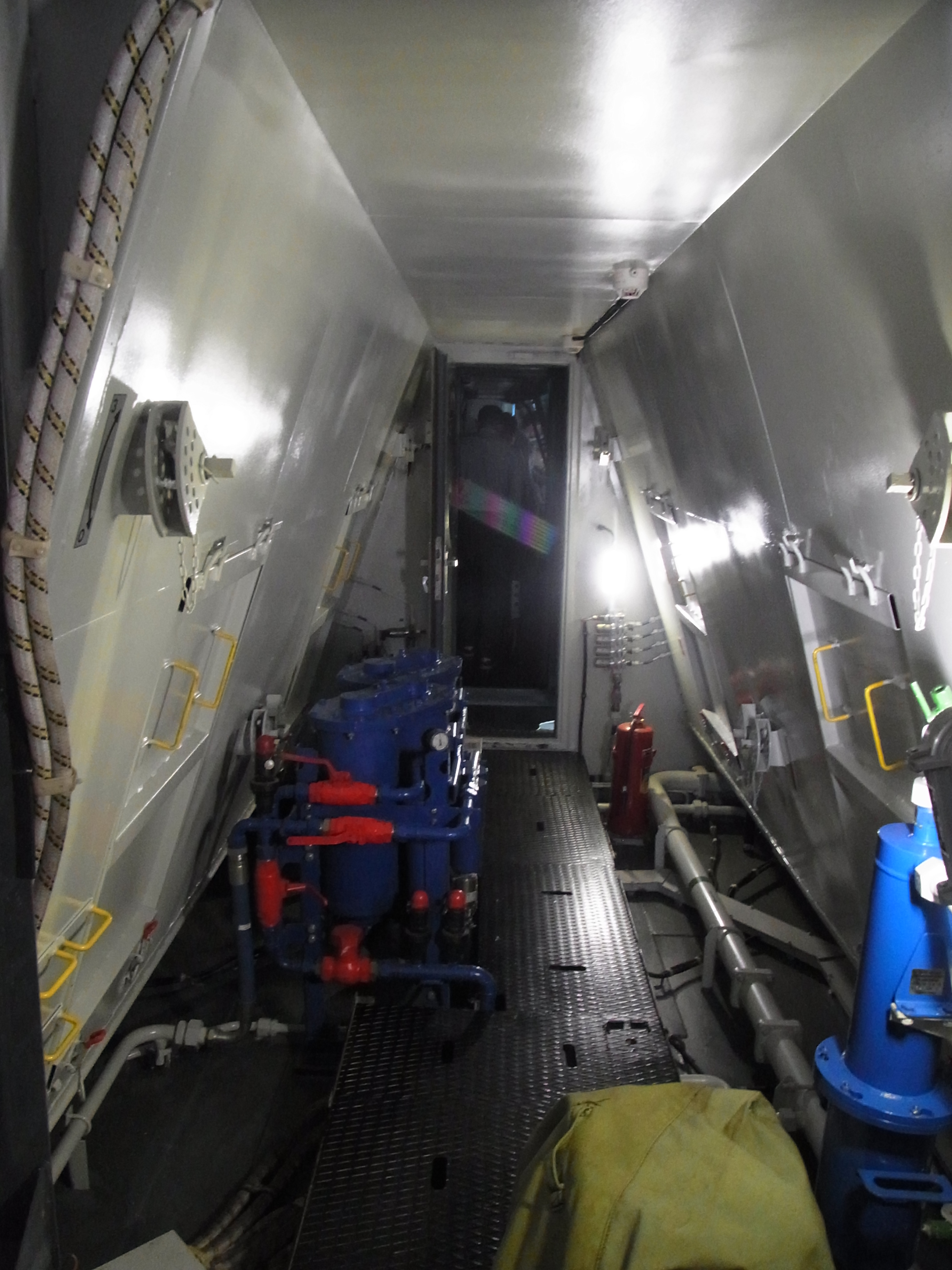 Коридор в холодильном отсеке тепловоза 3ТЭ25К2М-0001